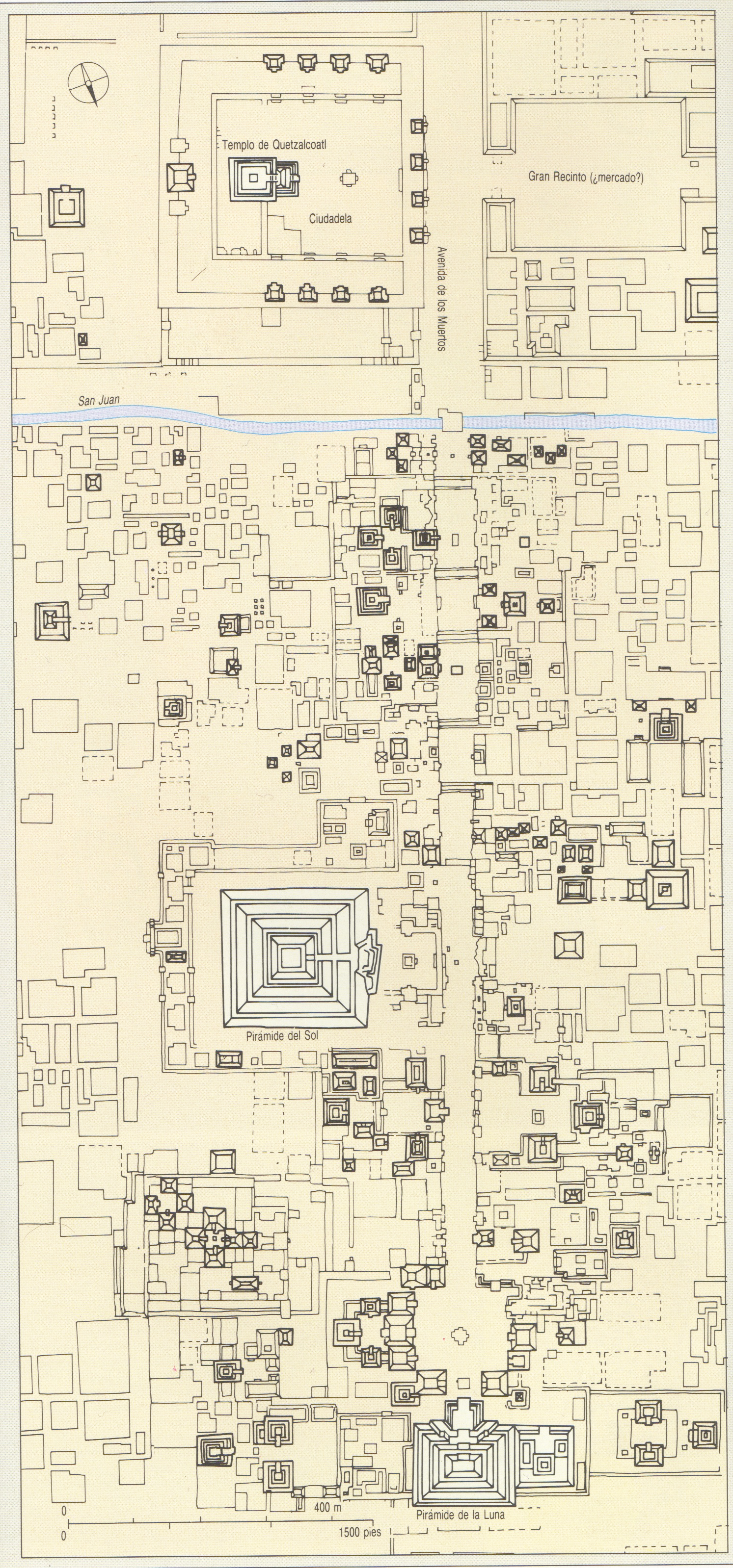 Planta general del conjunto